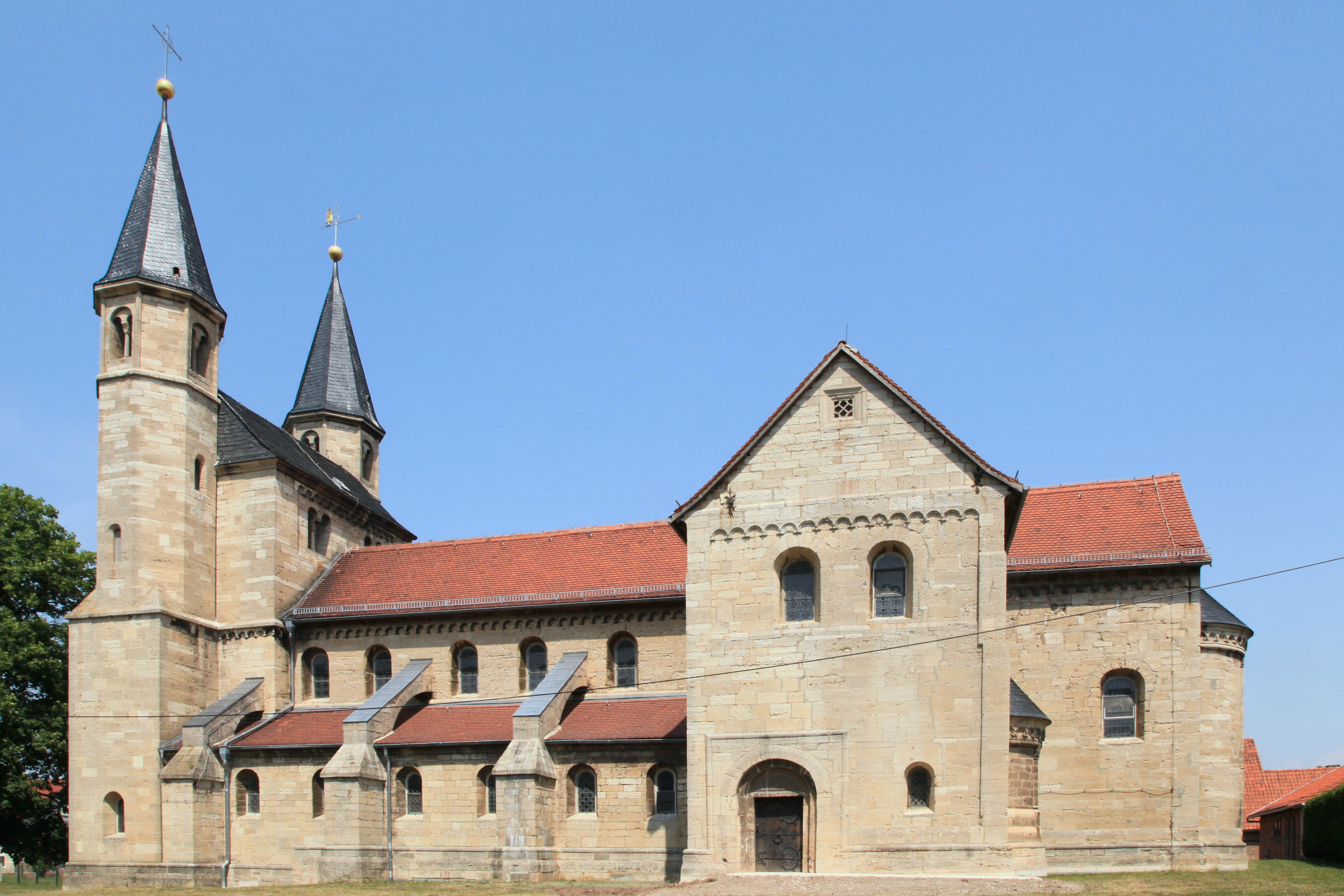 Klosterkirche St. Gangolf, Klosterstraße in Münchenlohra, Großlohra